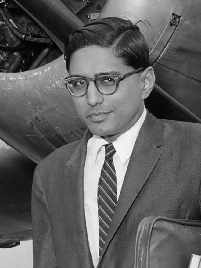 Aankomst van Muriel Smith , Rajmaham Ghandi en Ann Buckels op Schiphol, v.l.n.r. Ann Buckels , Muriel Smith en Rajmaham Ghandi op het platform 11 juli 1960